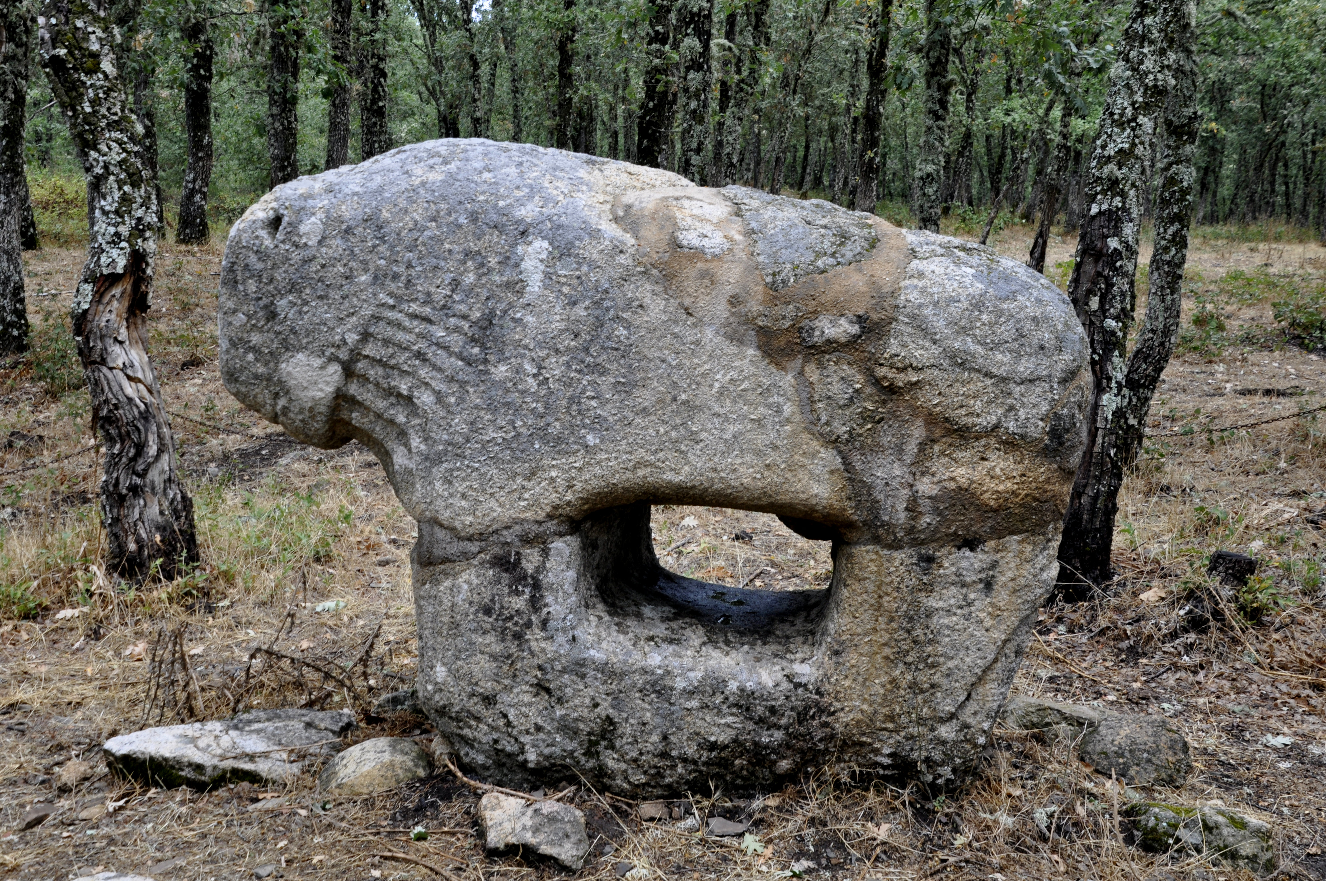 Ruinas Arqueológicas de Irueña